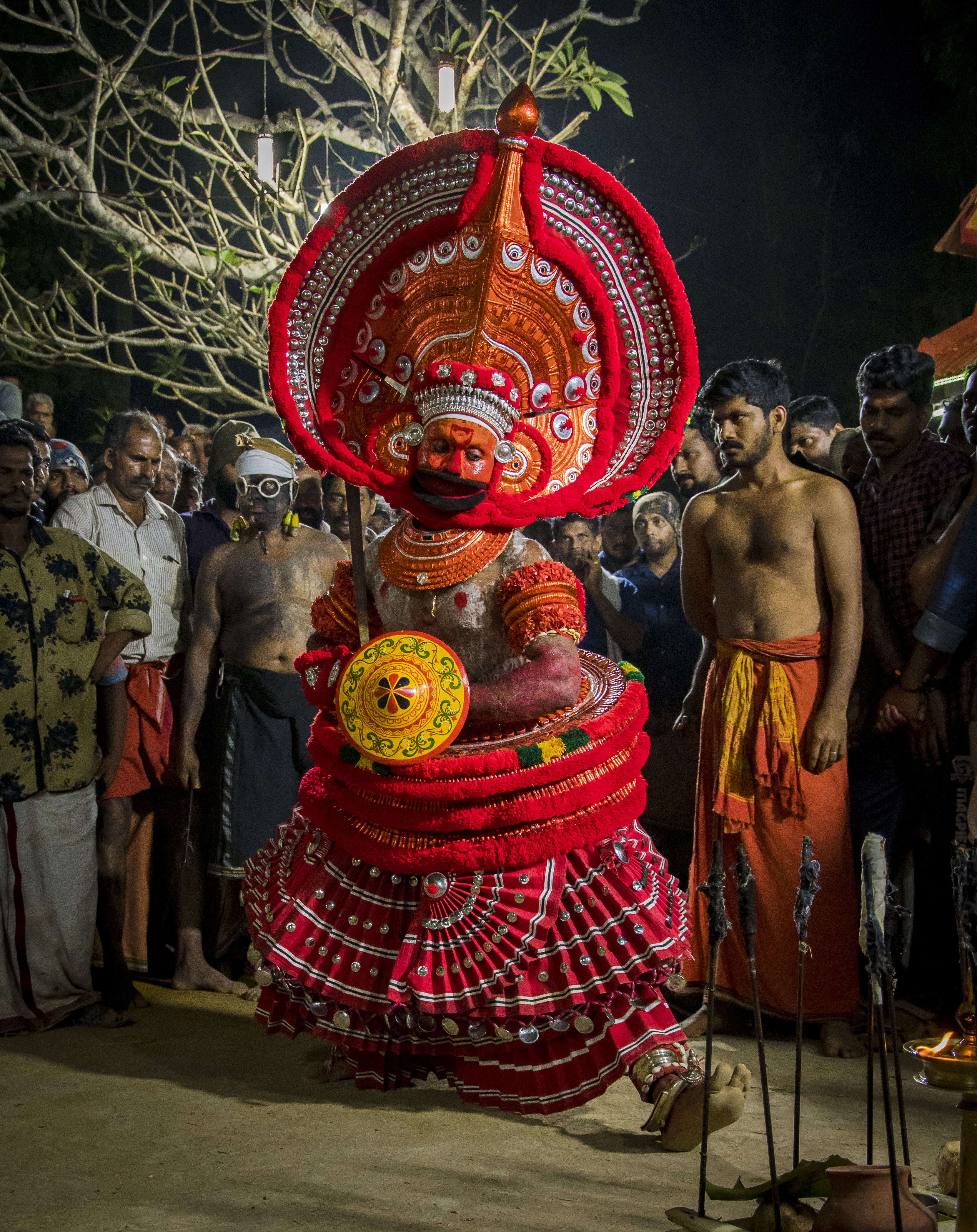 Kadavaankott maakkam Thira at Chala, Kannur